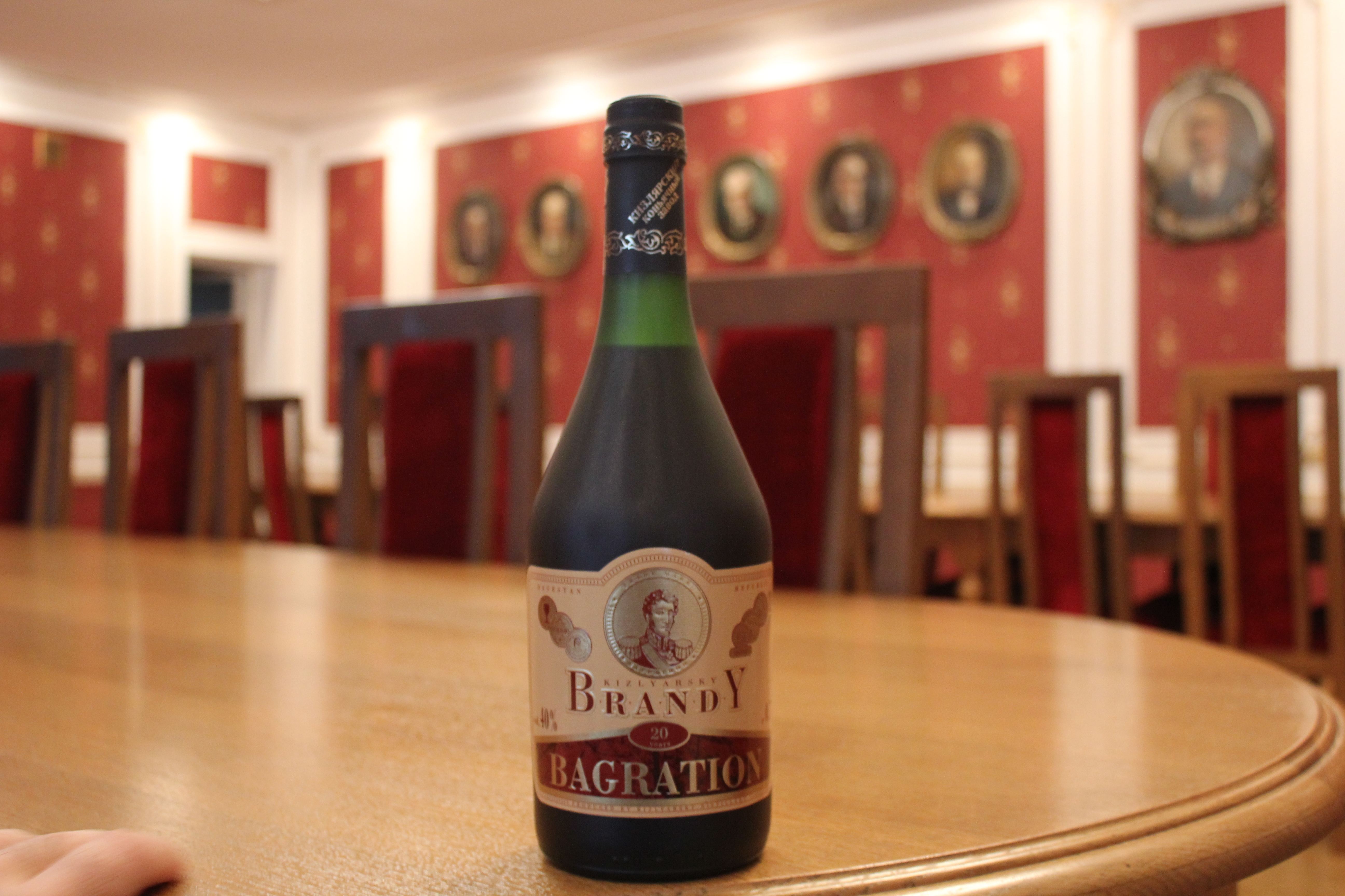 Бренди "Багратион" производства Кизлярского коньячного завода, выдержка 20 лет в дубовых бочках